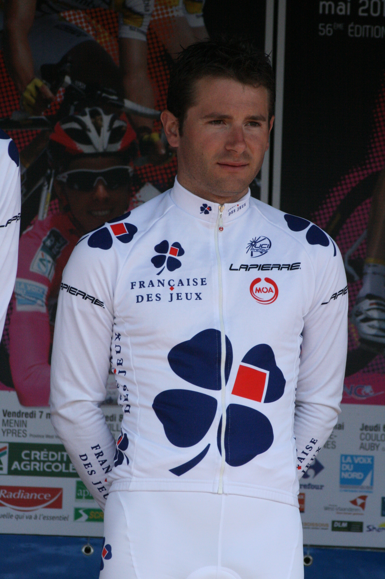 Pierre Cazaux, lors de la présentation des équipes des 4 jours de Dunkerque 2010